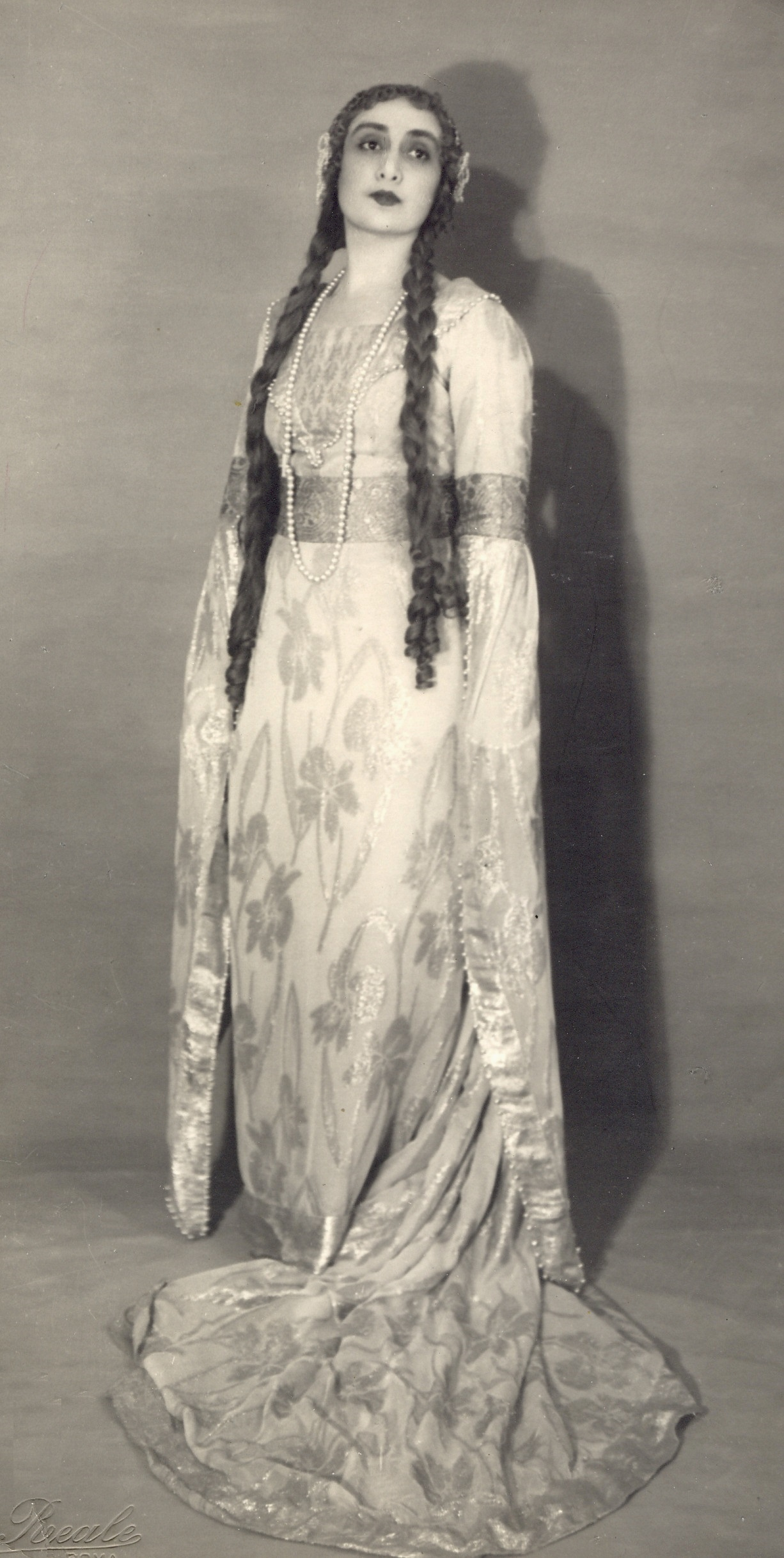 Mina d'Albore nel 1931